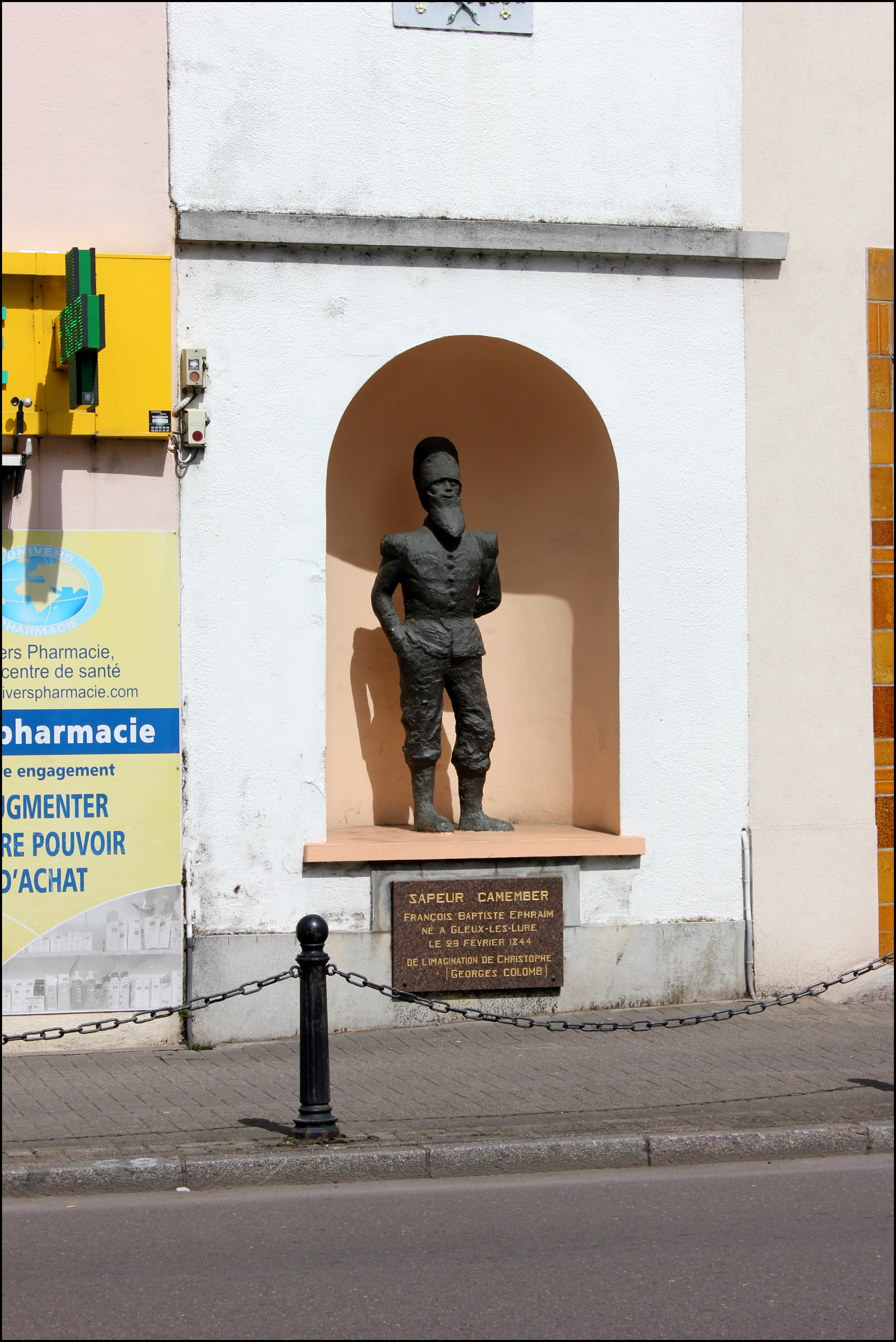 Statue du sapeur Camenber à Lure